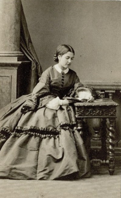 Келлер Софья Васильевна, урожденная гр. Бобринская (1837—1891), жена графа Виктора Фёдоровича Келлера (1834—1906).